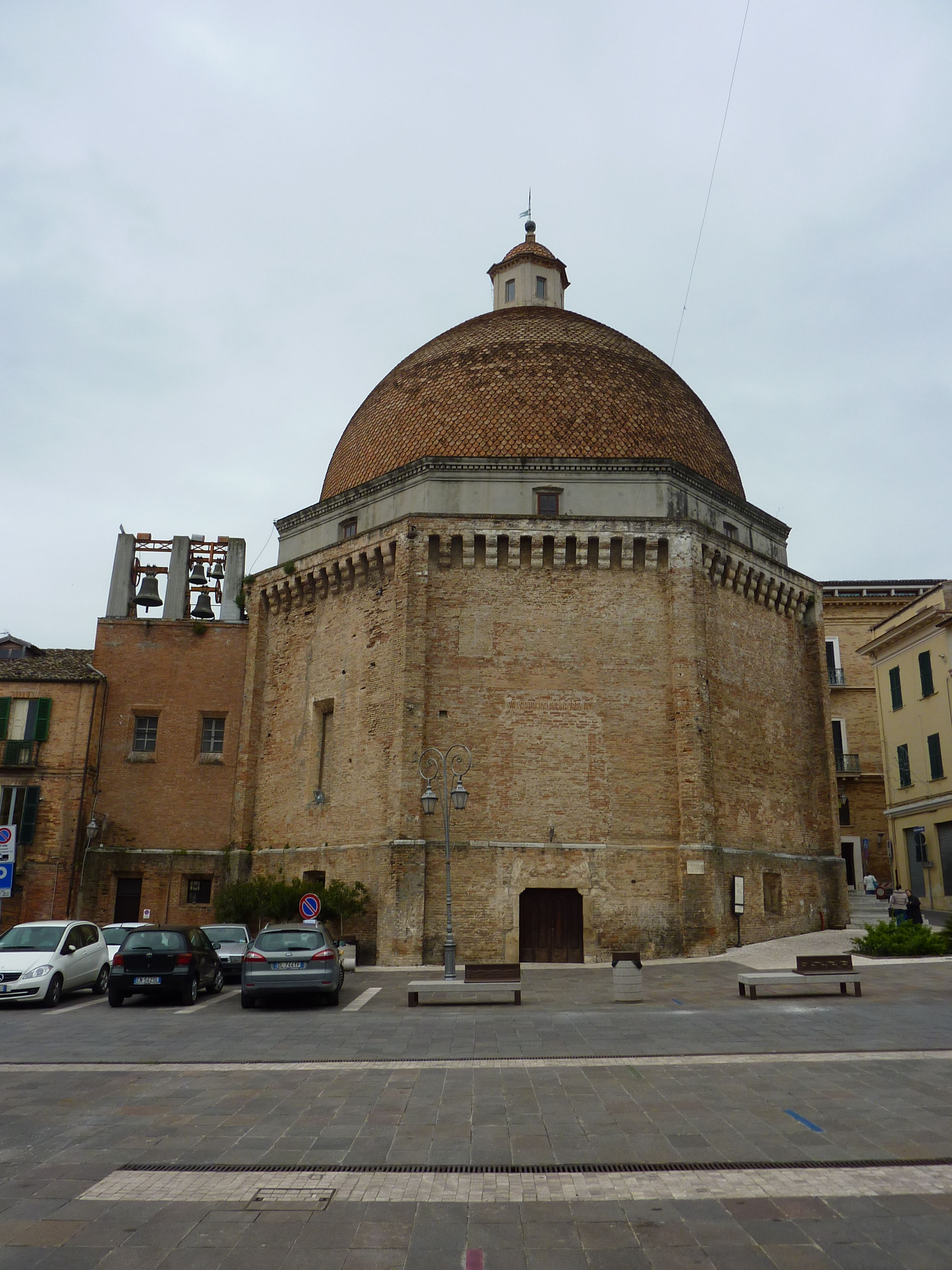 San Flaviano